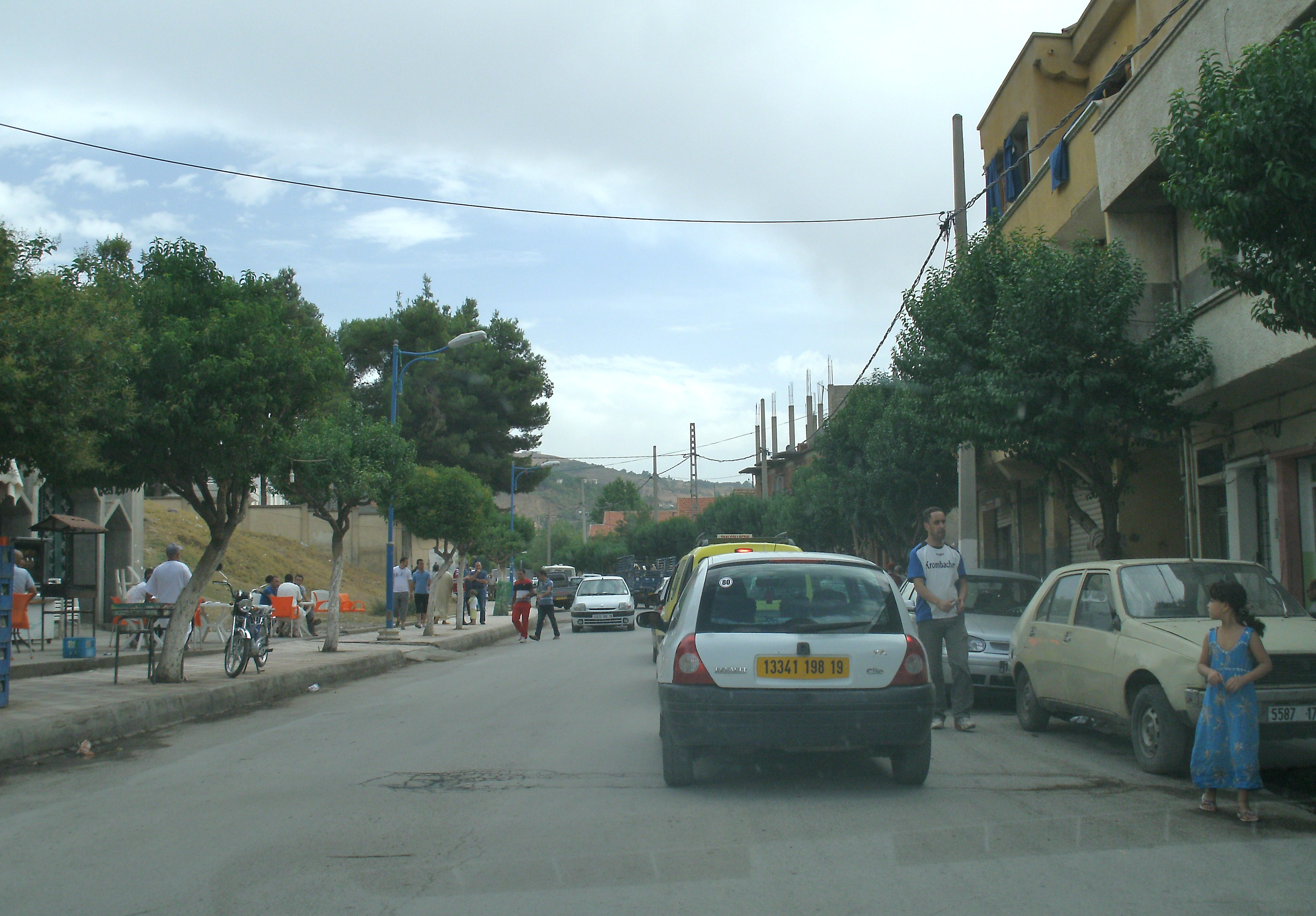 Beni Aziz, le centre ville